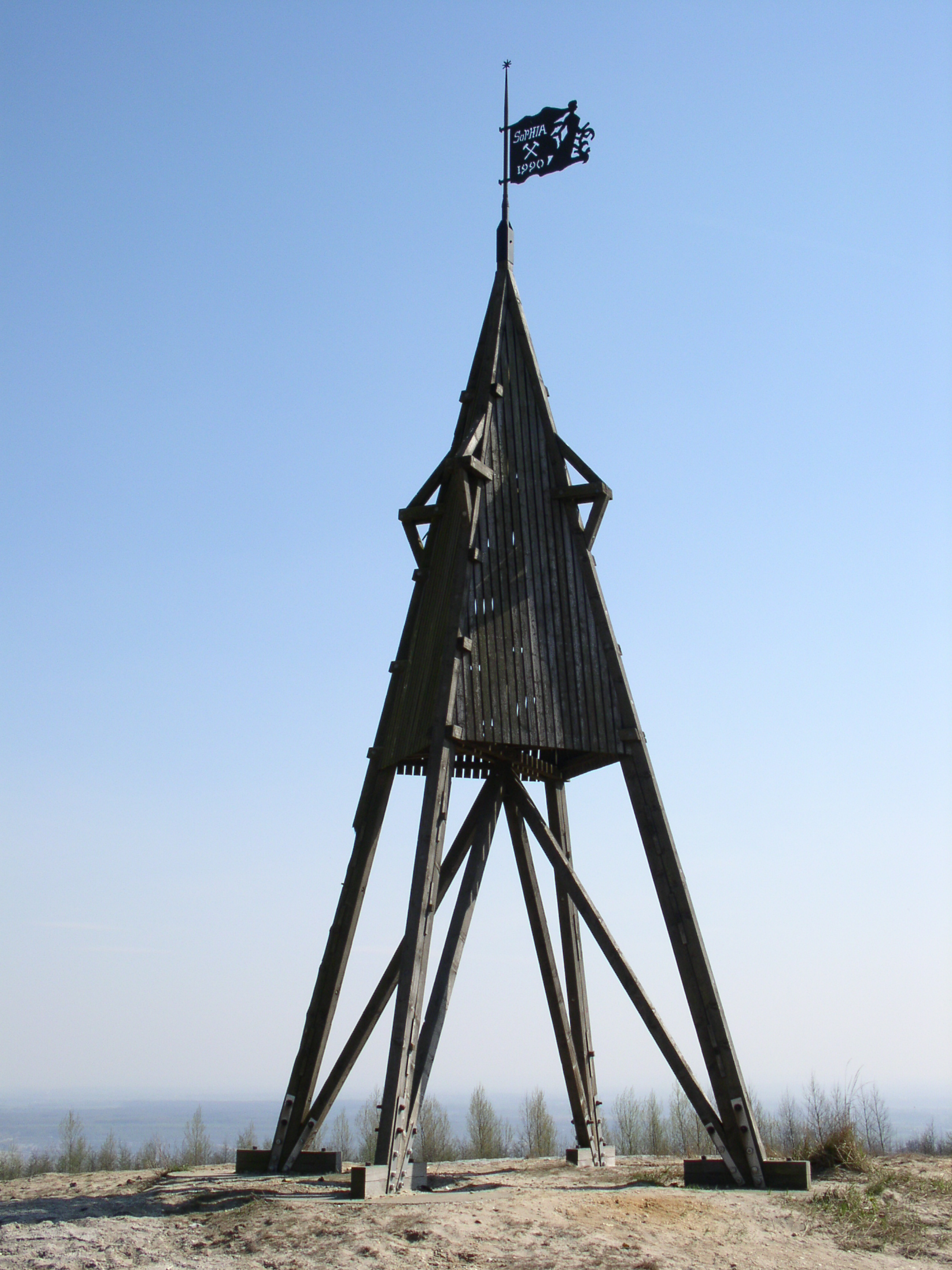 Höller Horn (280 m ü. NN) auf der Sophienhöhe